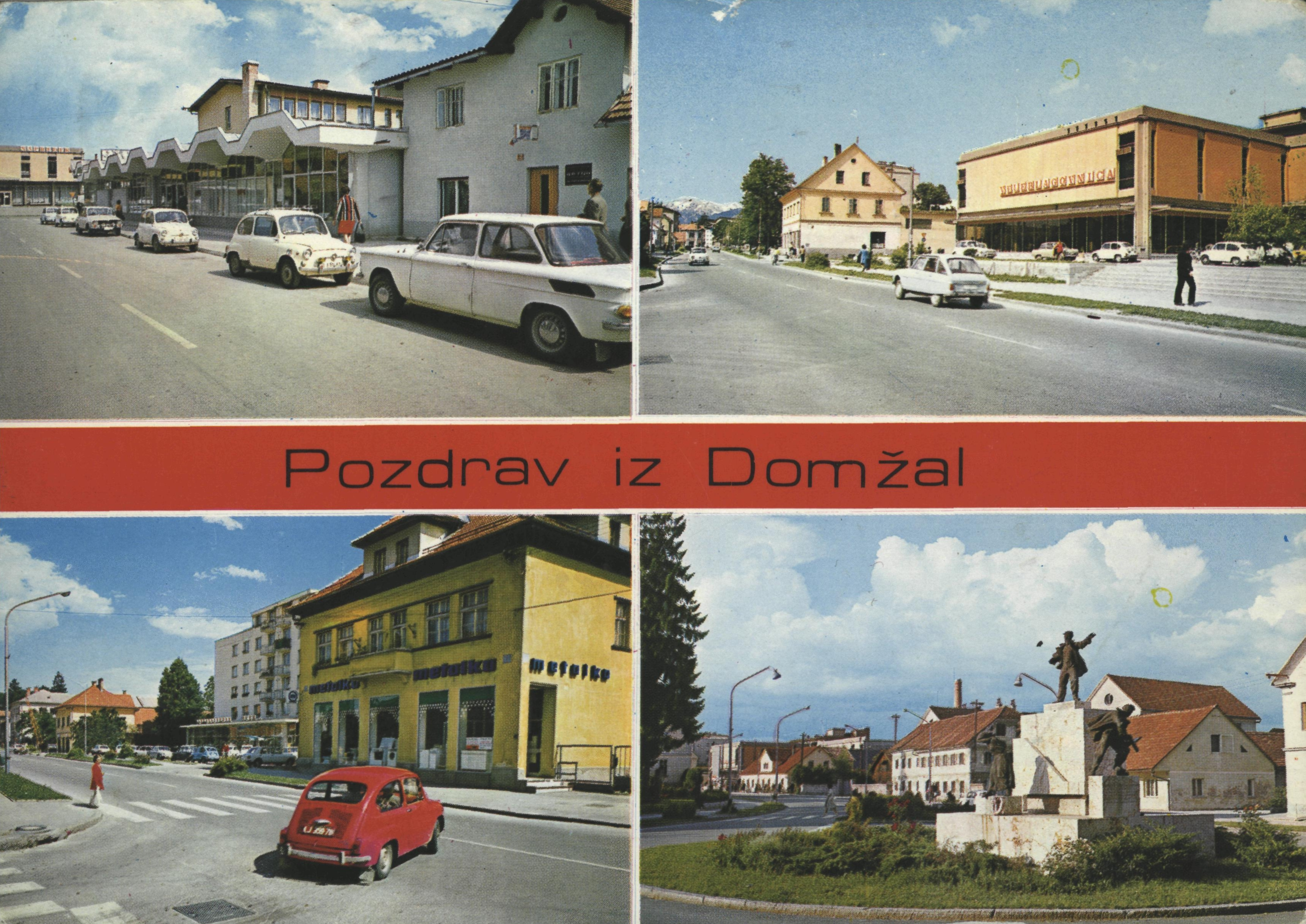 Razglednica Domžal.